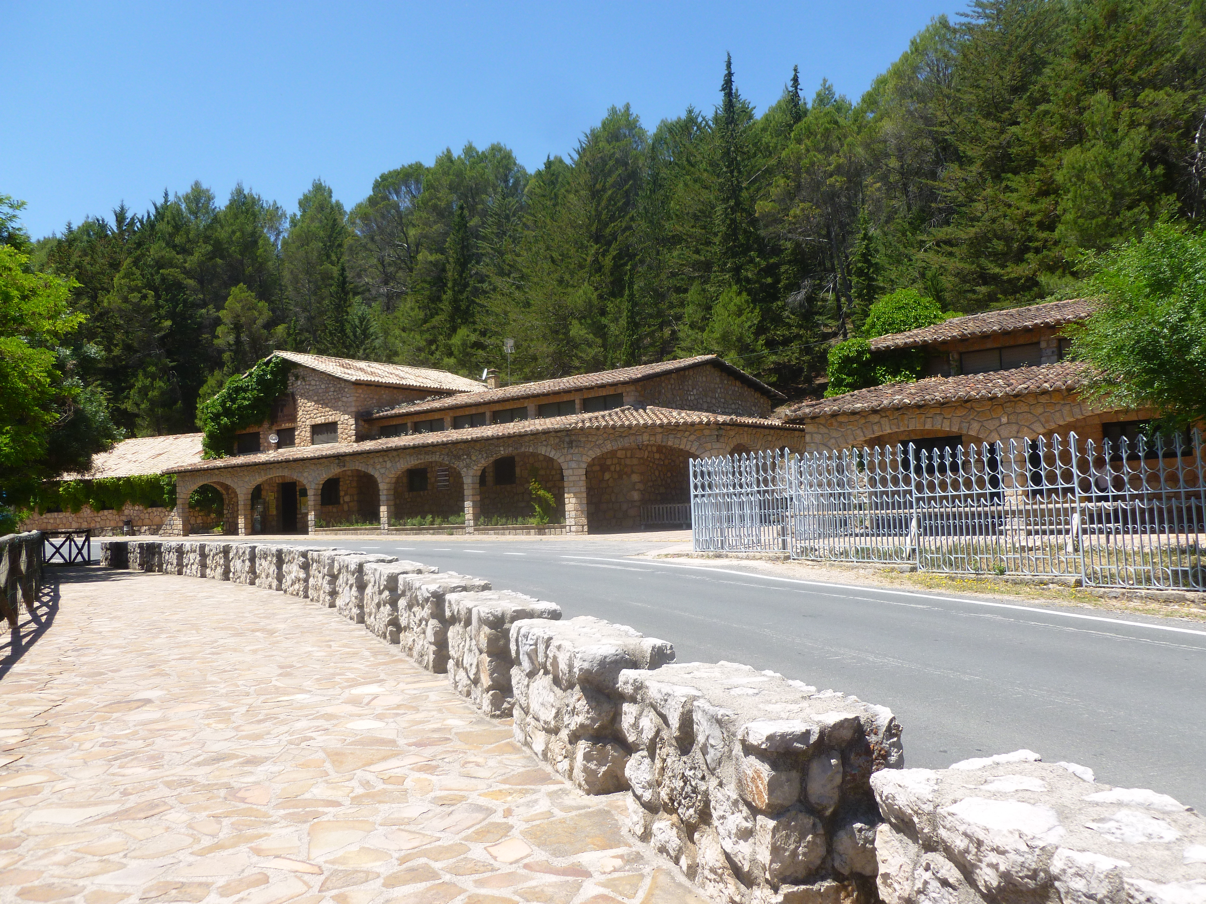 Jardín botánico Torre del Vinagre. Parque natural de las Sierras de Cazorla, Segura y Las Villas This is a photography of a Site of Community Importance in Spain with the ID: ES0000035. Natura2000 entry, EEA entry